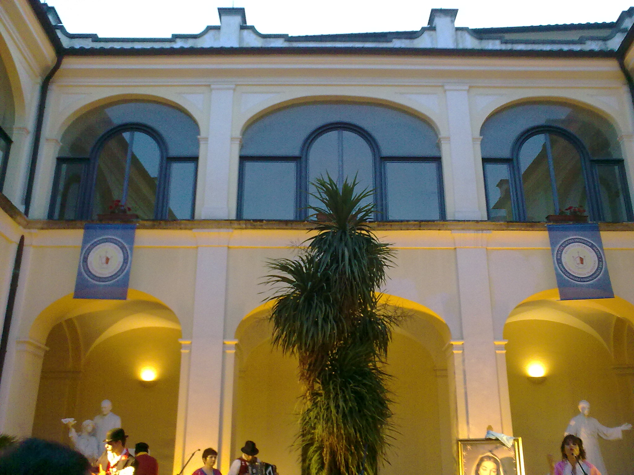 Cortile della curia diocesana del Borgo Vescovado, Nocera Inferiore